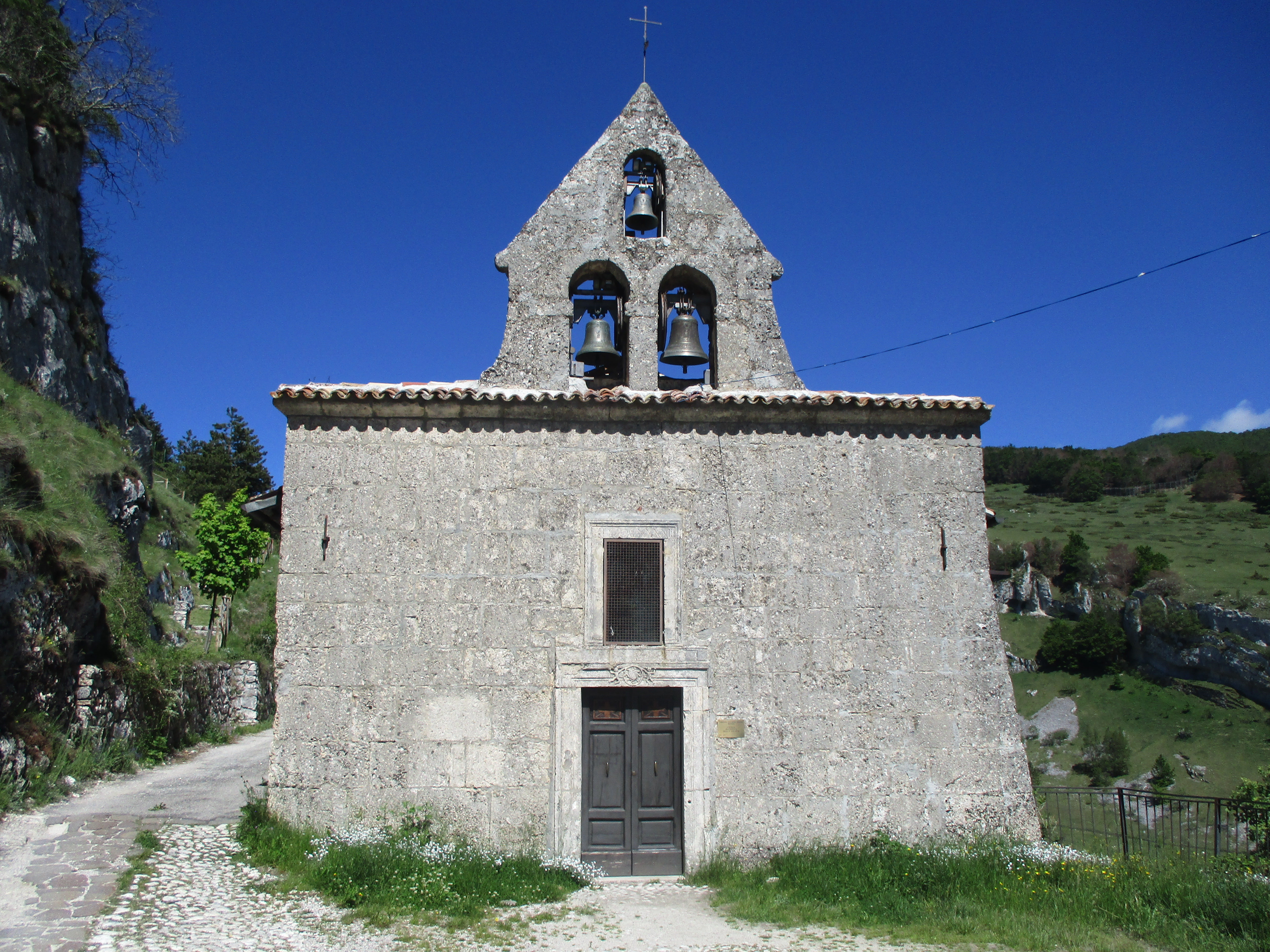 Chiesa della Madonna delle Grazie